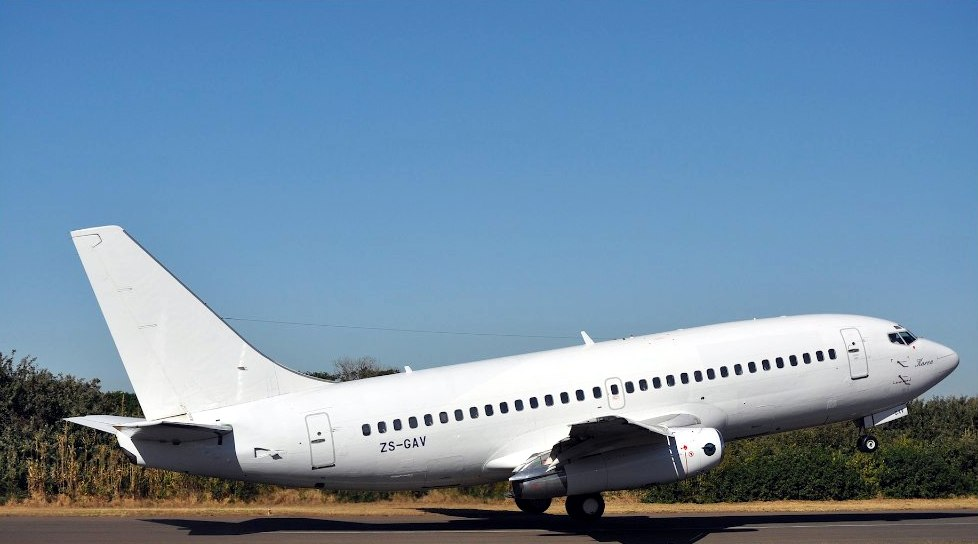 AirQuarius (ZS-GAV) “Karen” Boeing 737-200